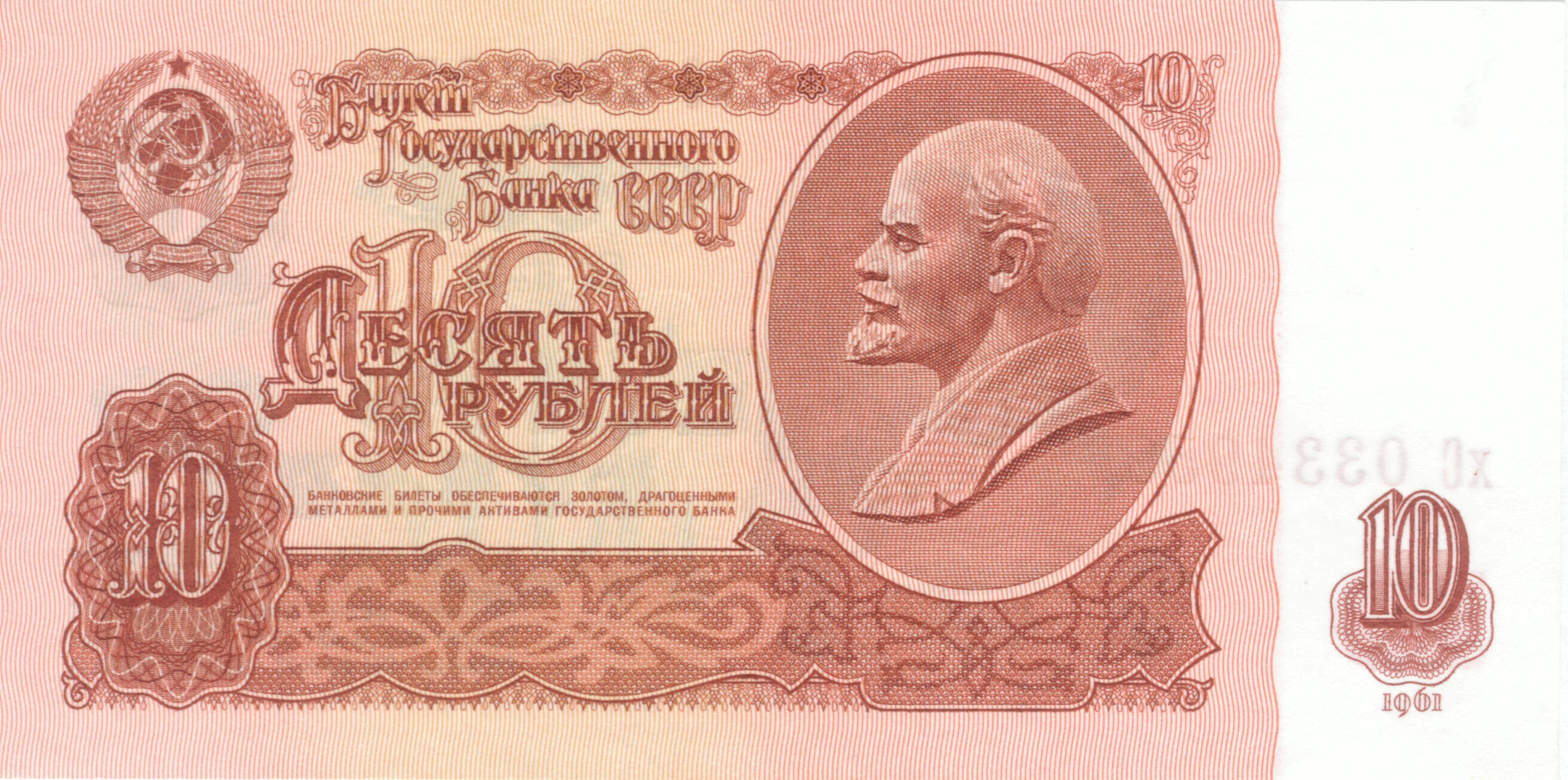 1961 Soviet Union 10 rubles bill obverse. Цвета естественные.